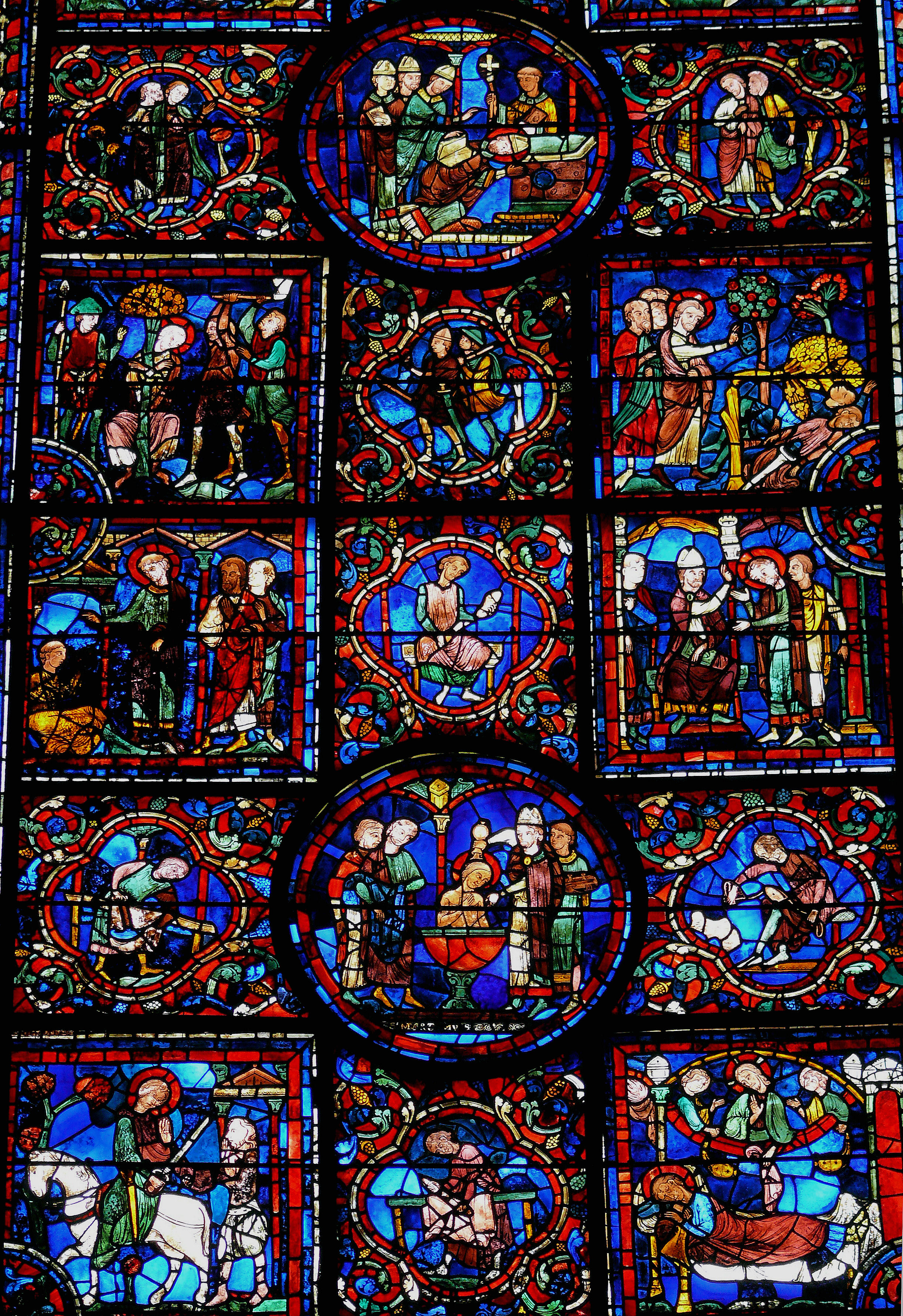 Cathédrale de Chartres - Choeur - Vitrail de la Vie de saint Martin - Baptême de saint Martin - Saint Martin évêque